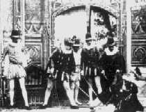 Кадр из фильма «Убийство герцога Гиза» (1908).